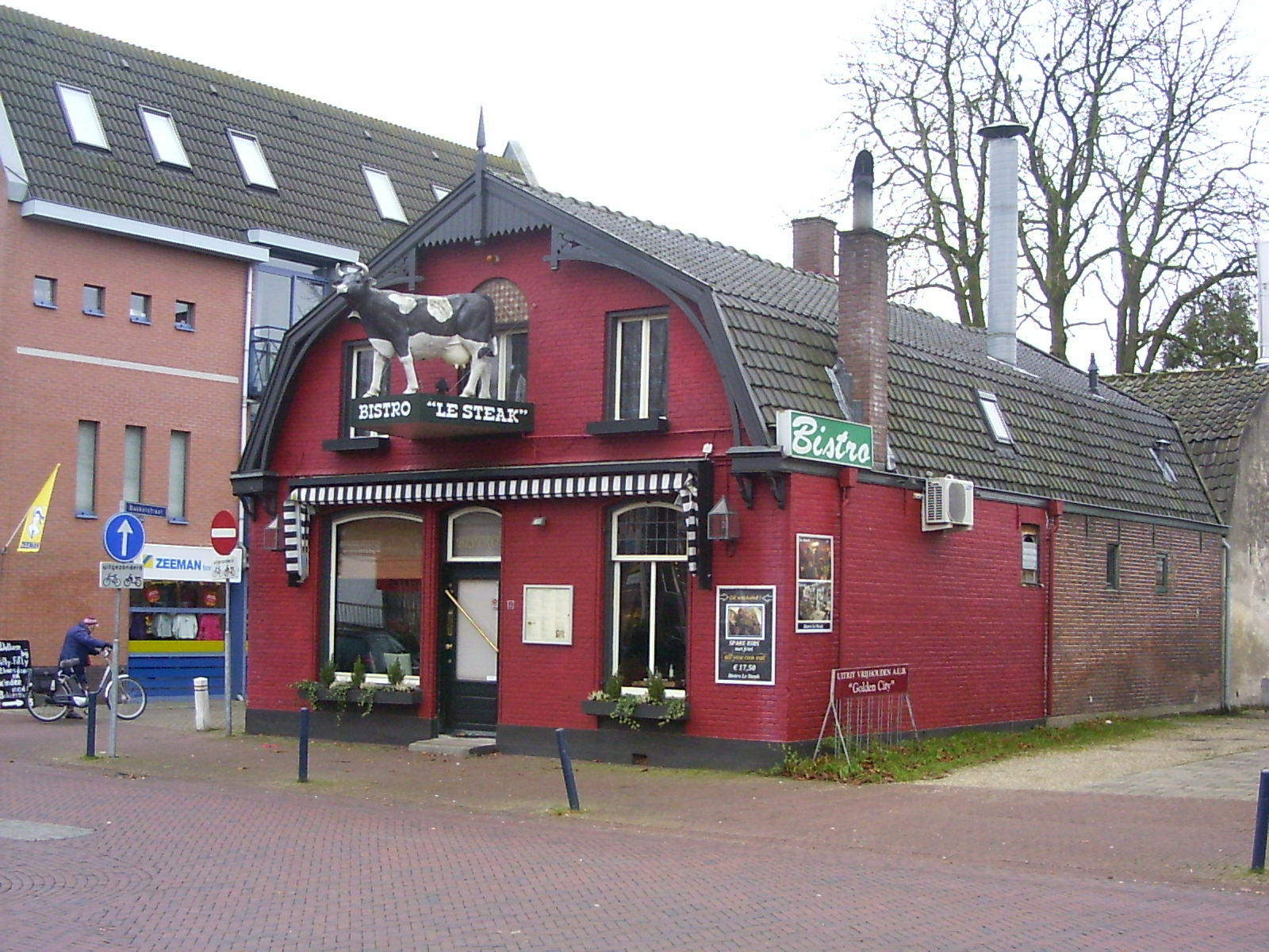 Bennekom, Dorpsstraat, Le Steak, gemeentelijk monument